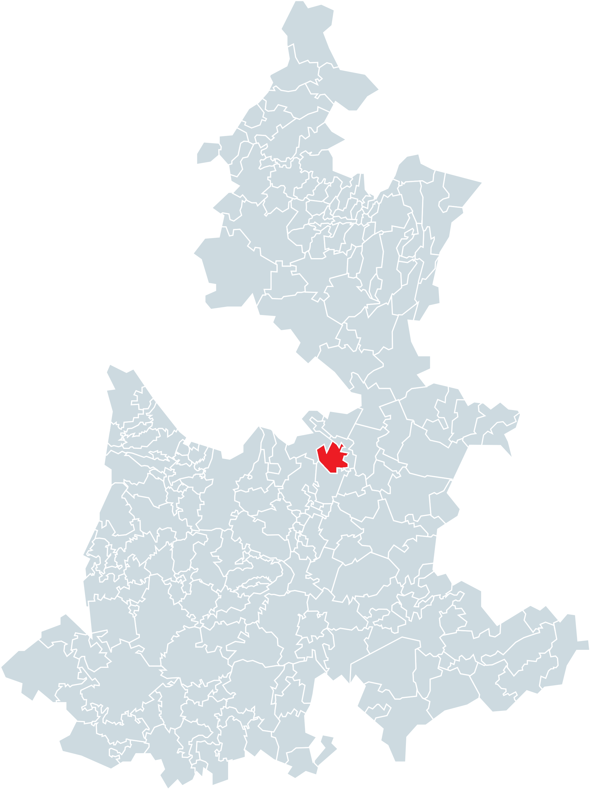 Municipio de Soltepec